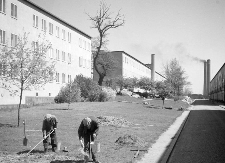 Hjorthagens funkisbebyggelse och parkarbete i Hjorthagen